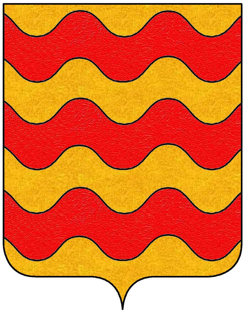 Stemma Famiglia Gallerani - Siena